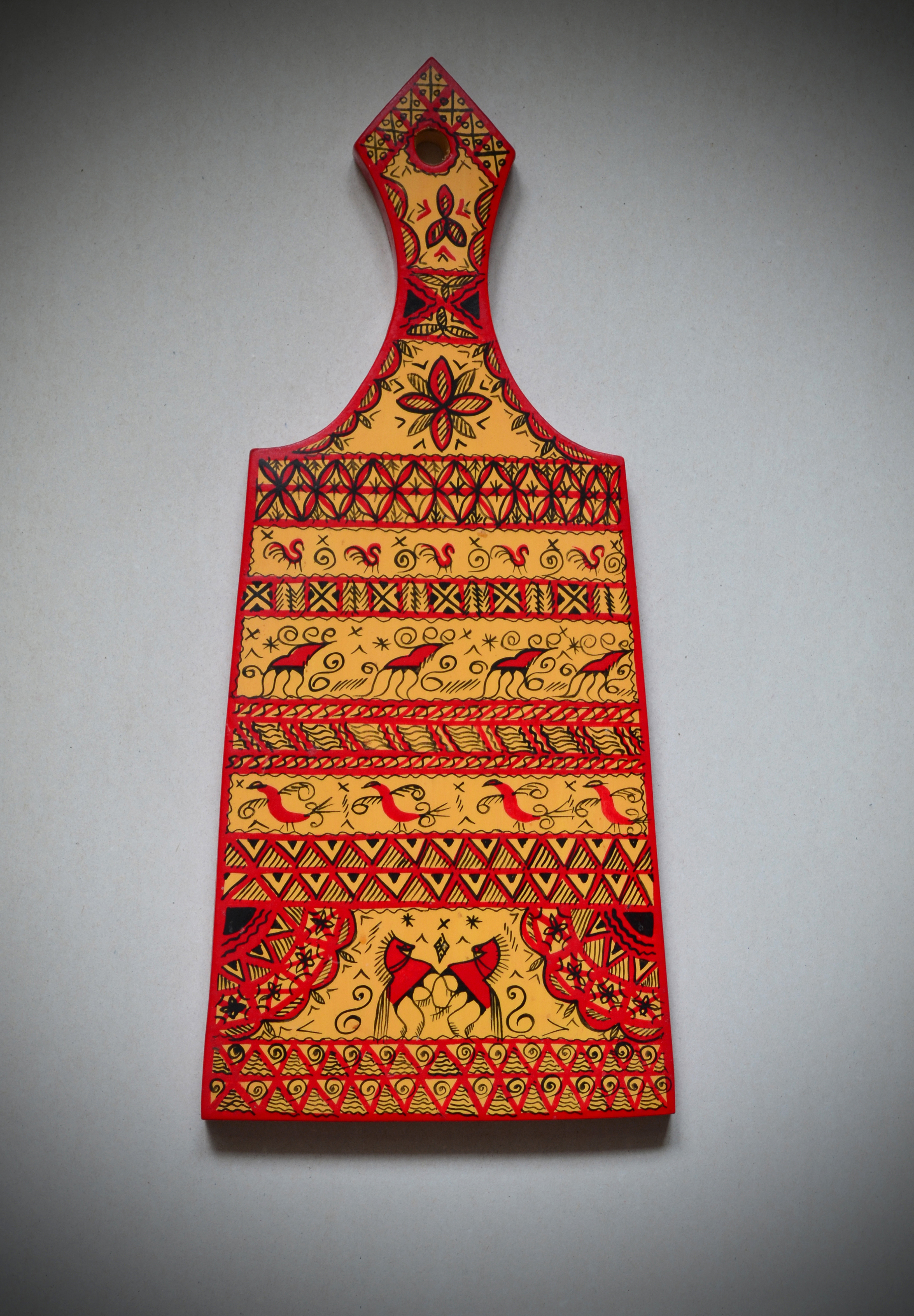 Мезенская роспись на доске.Россия,Архангельская область.